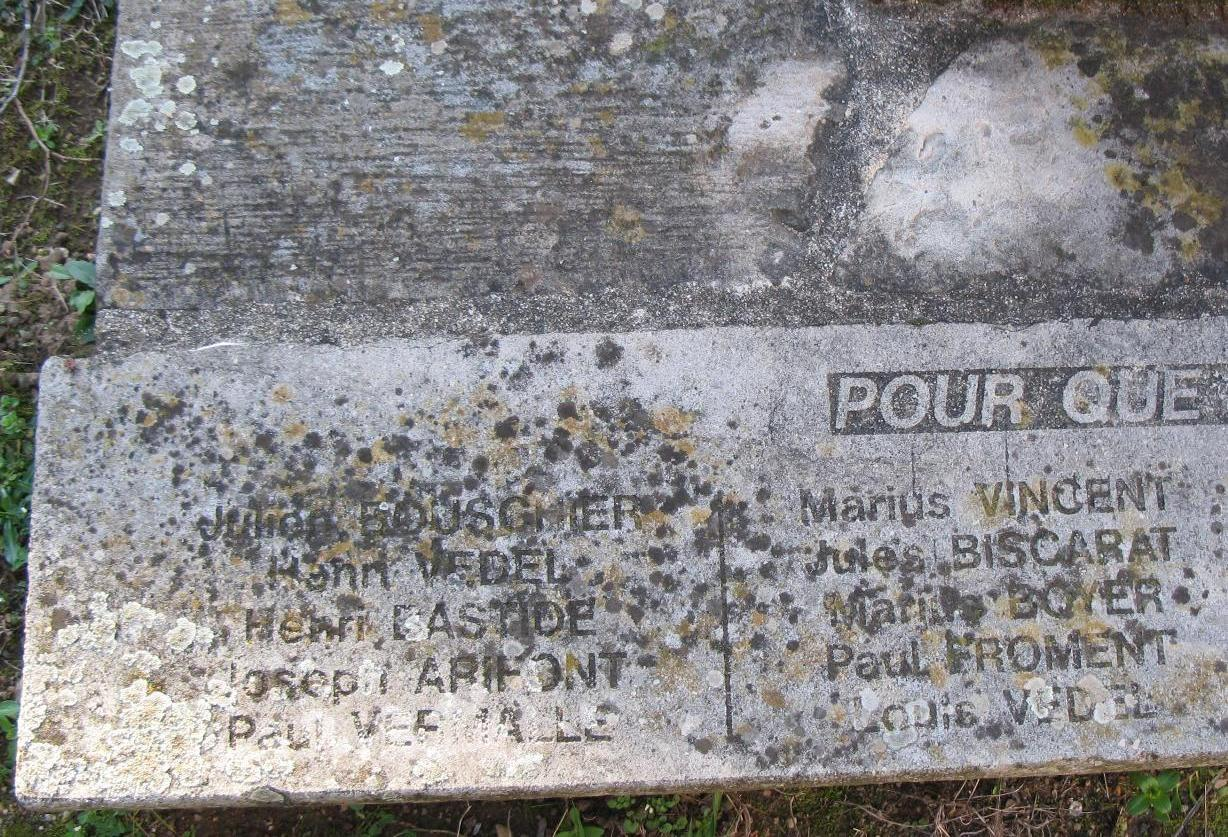 Monument aux morts de Ribes (Ardèche)